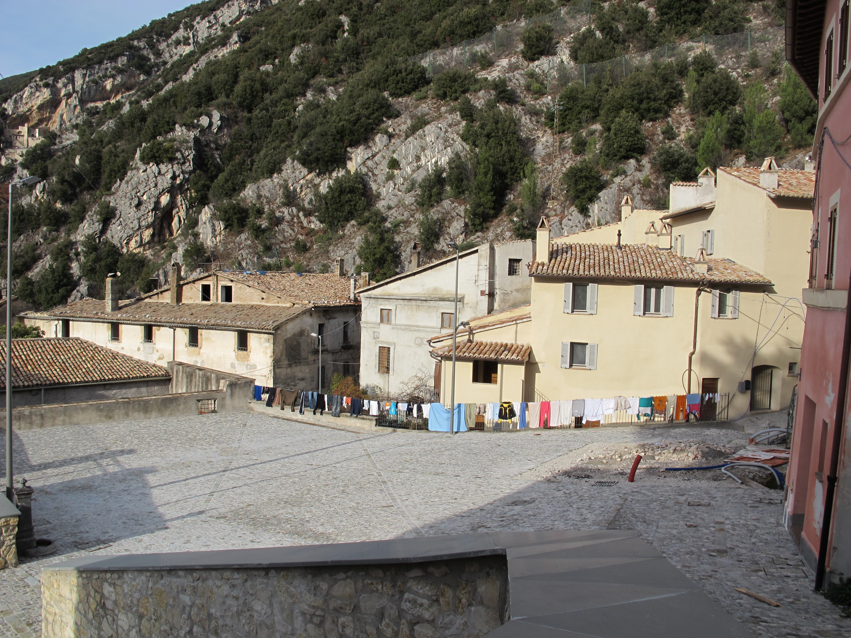 Pale, piazza elisei 041